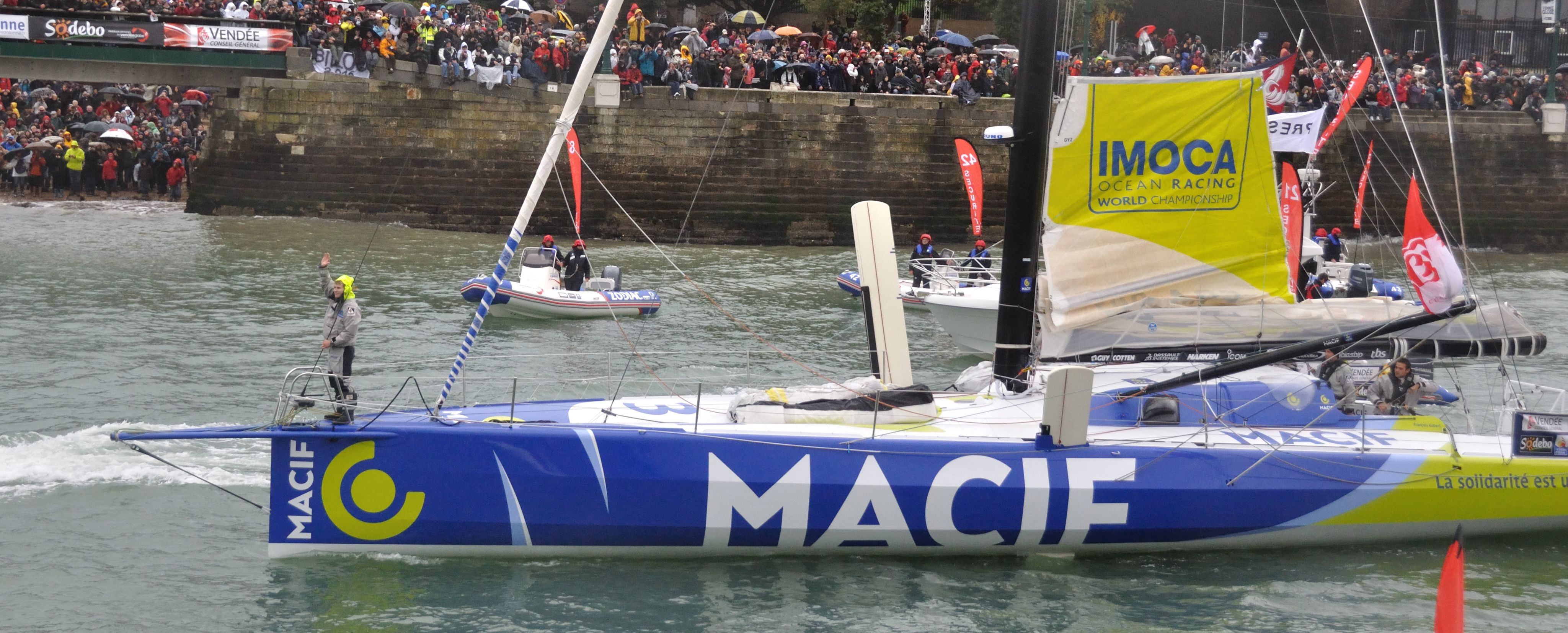 Vendée Globe 2012-2013 : François Gabart sur Macif au départ des Sables d'Olonne